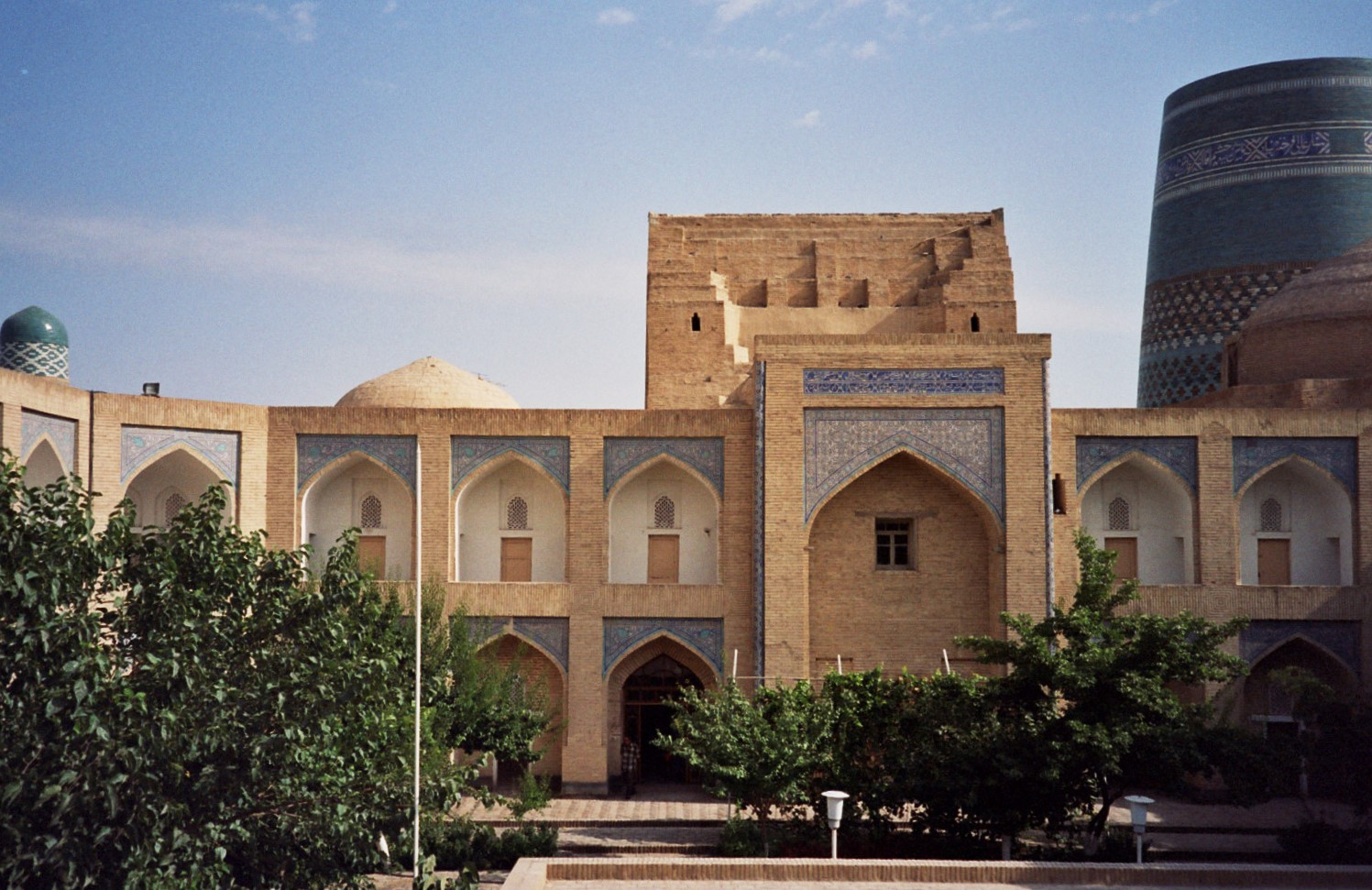 Muhammad-Amin-Khan Madrasa in Khiva, Uzbekistan